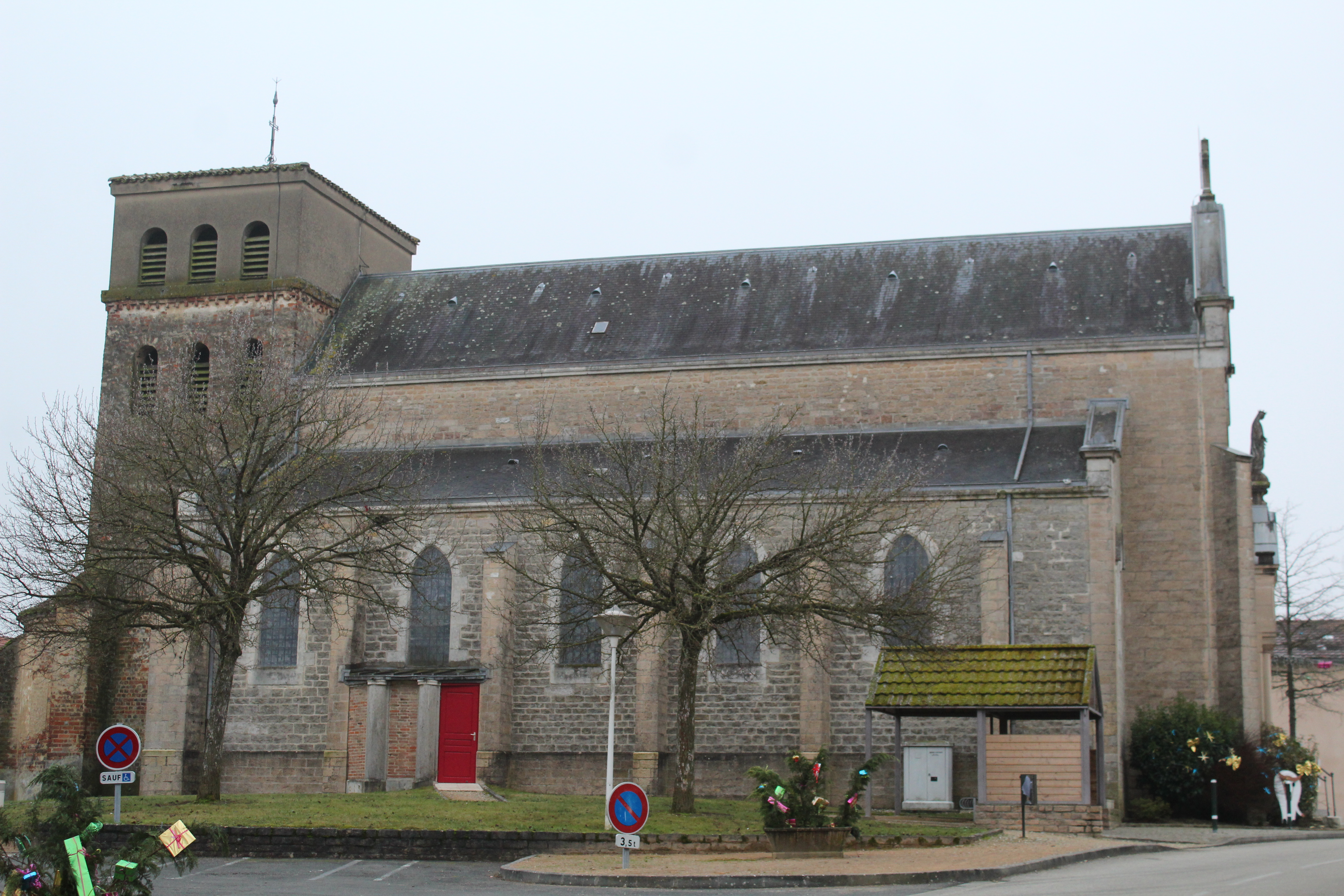 Église Saint-Martin de Saint-Martin-le-Châtel.